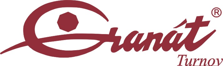 Oficiální logo firmy Granát, družstvo umělecké výroby, Turnov